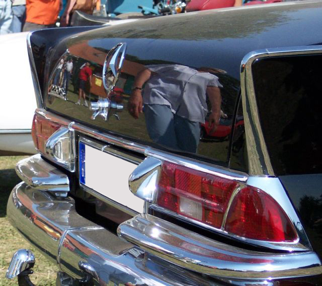 Heckflosse an einem Mercedes 220S